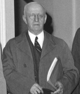 Christiaan Wilhelm Bodenhausen (1869-1966), Nederlands politicus